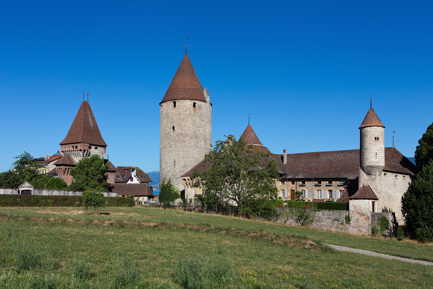 Château de Chenaux in Estavayer-le-Lac (FR)